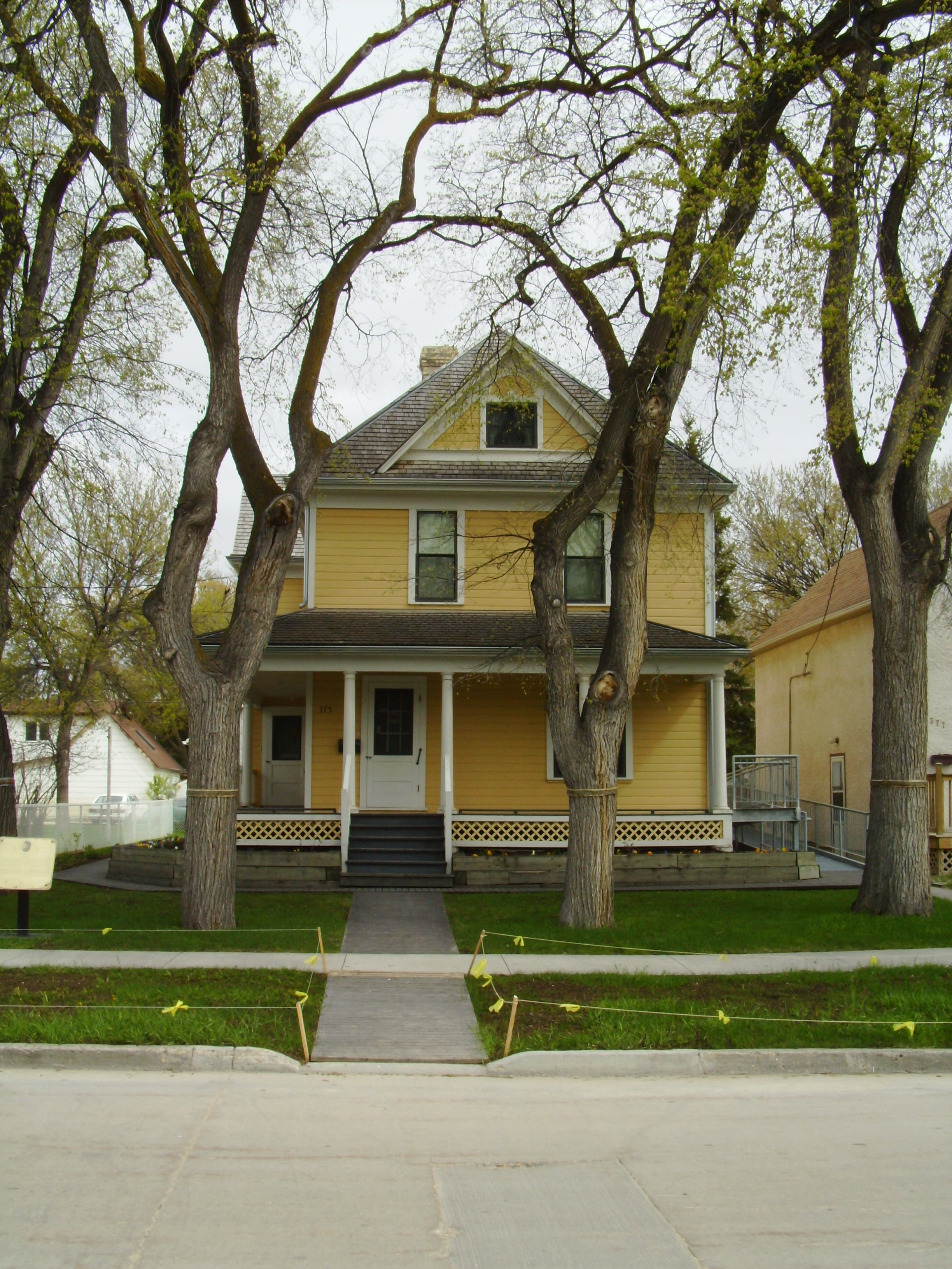 Maison d'enfance de Gabrielle Roy à Saint-Boniface, située au 375, rue Deschambault.